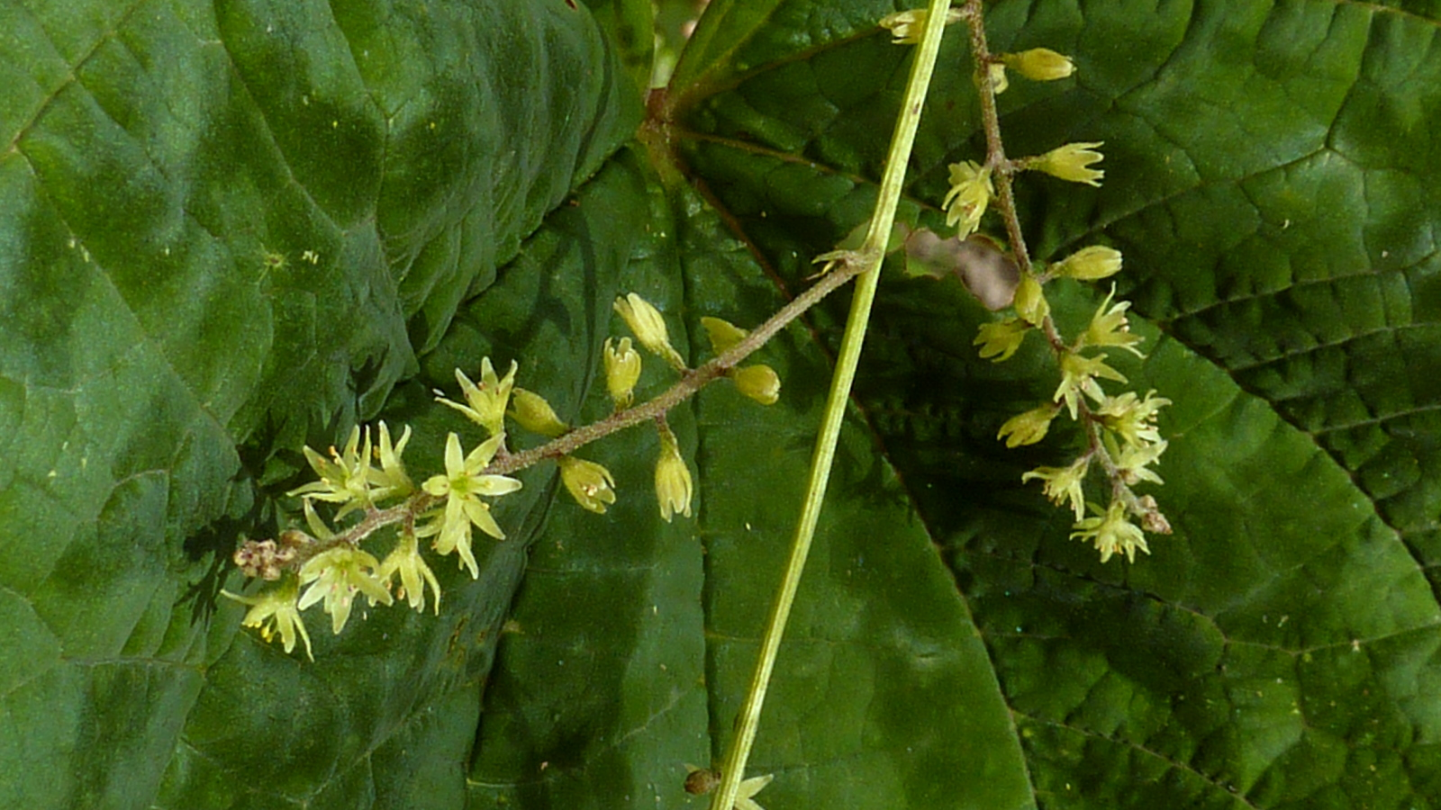 Dioscorea dodecaneura Vell.